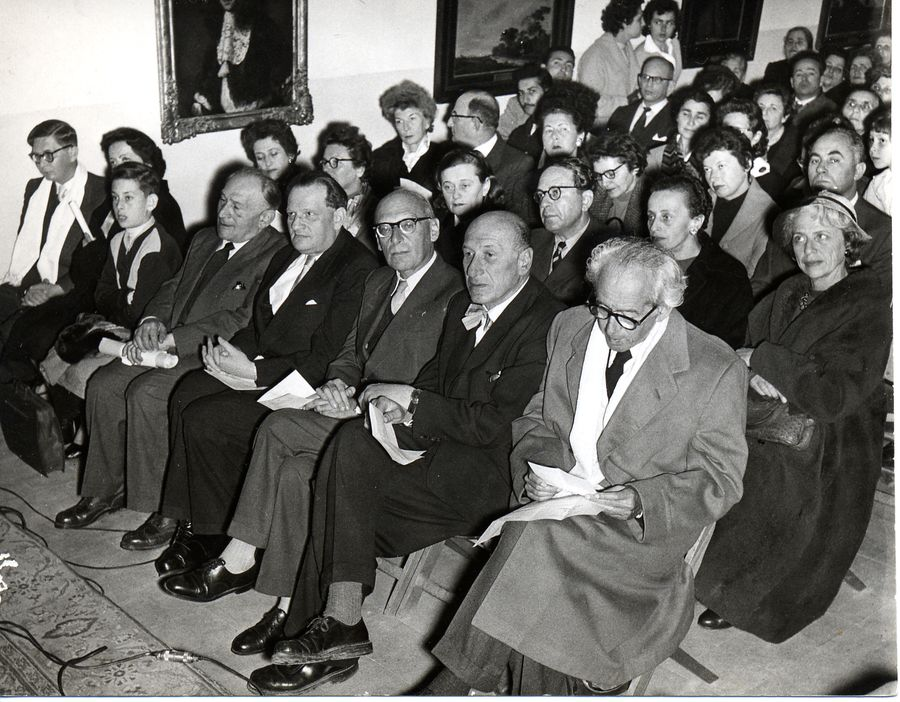 בשורה הראשונה, מימין לשמאל: הצייר ראובן רובין, קראל שלמון, פאול בן-חיים, עדן פרטוש, המנצח מיכאל טאובה, הפסנתרן משה לוסטיג. (מס' קטלוגי: MUS 055 / M56)